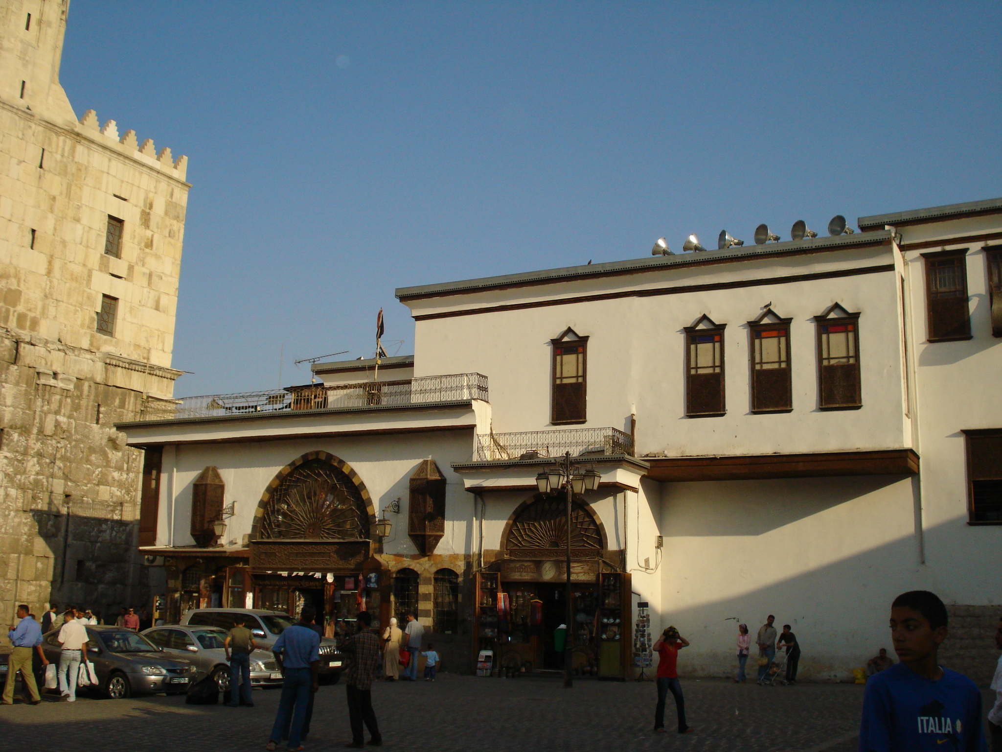 بيوت عربية قديمة في دمشق القديمة قرب الجامع الأموي